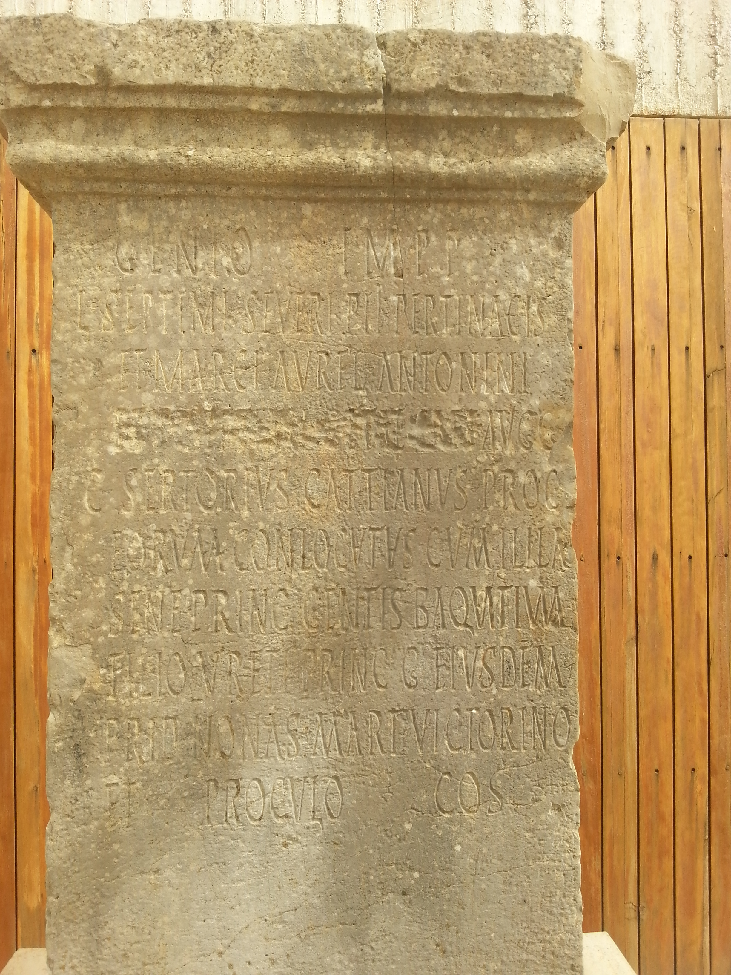 Dédicace à Septime Sévère, Caracalla et Geta sur un autel de la paix, lors d'un traité entre le procurateur Sertorius Cattianus et Ililasenis, fils d'Uretus, prince des Baquates. La dédicace est datée du 6 mars 200 et a été découverte en 1952.